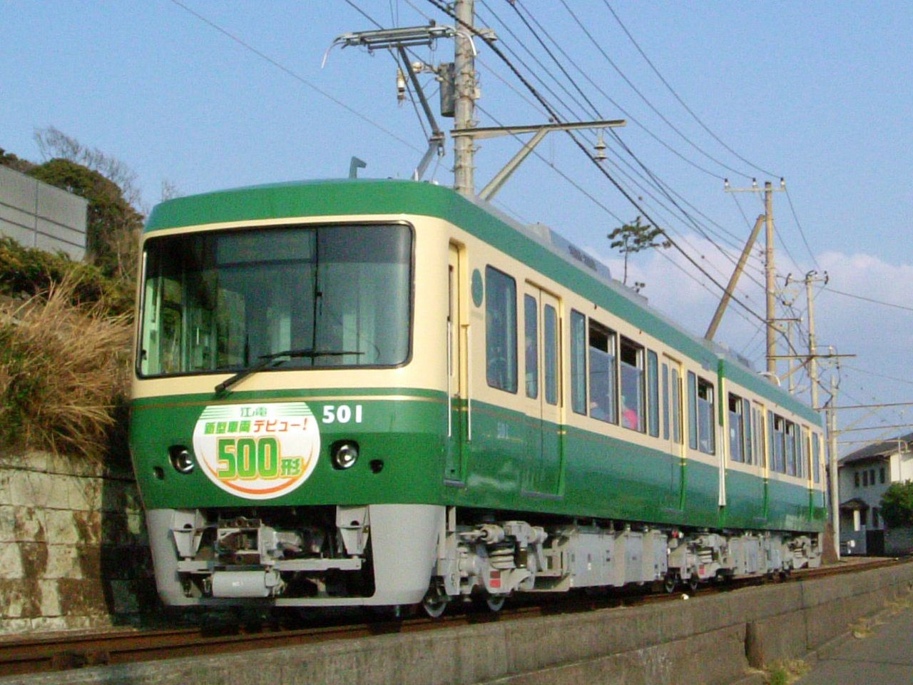 営業開始当日の江ノ電500形(2代)。